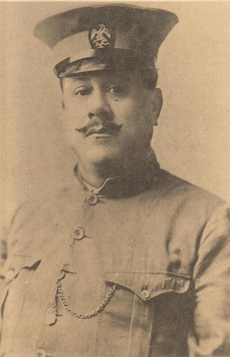 General Benjamín Hill, Secretario de la Defensa Nacional